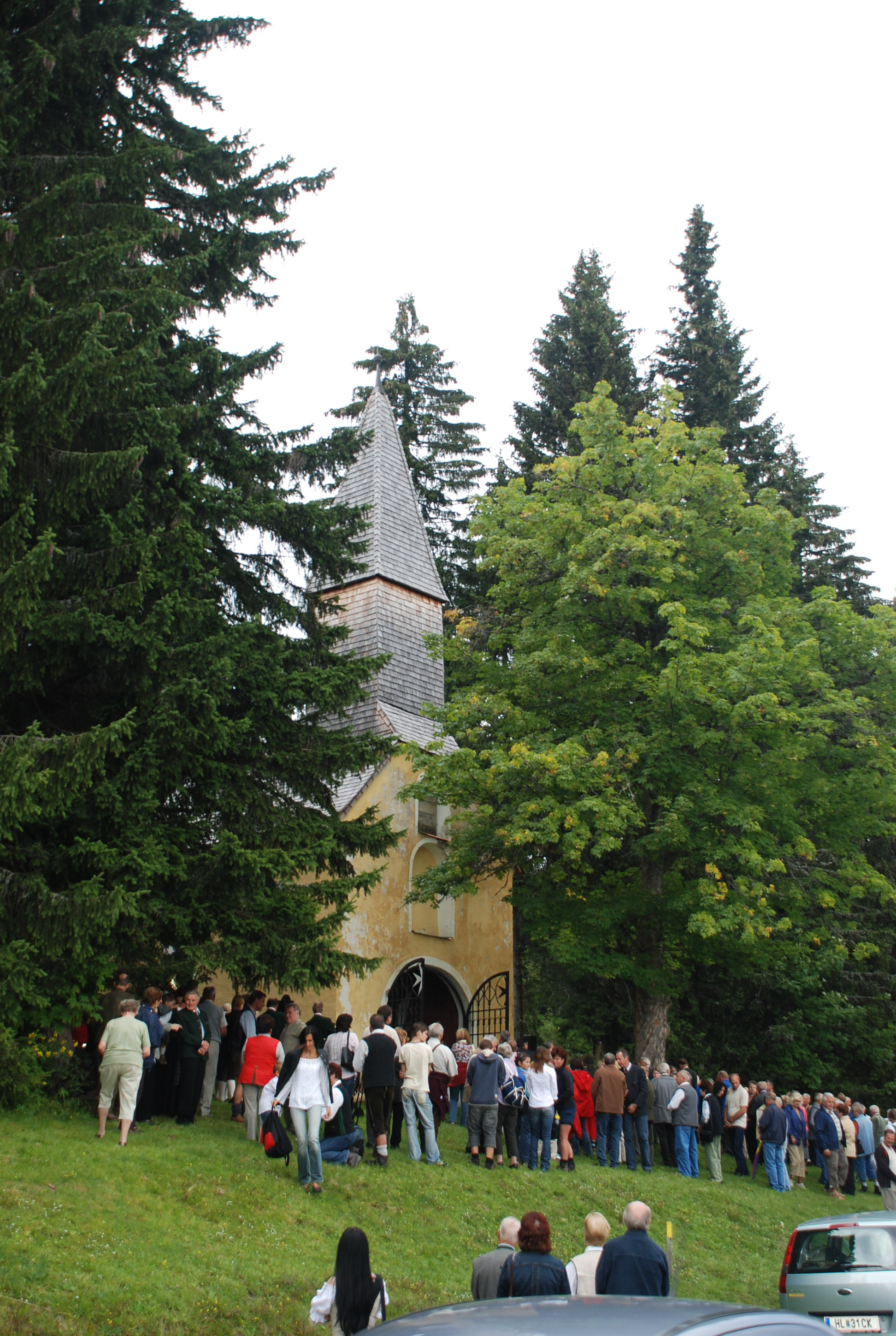 Messe bei der Hebalmkapelle 2007